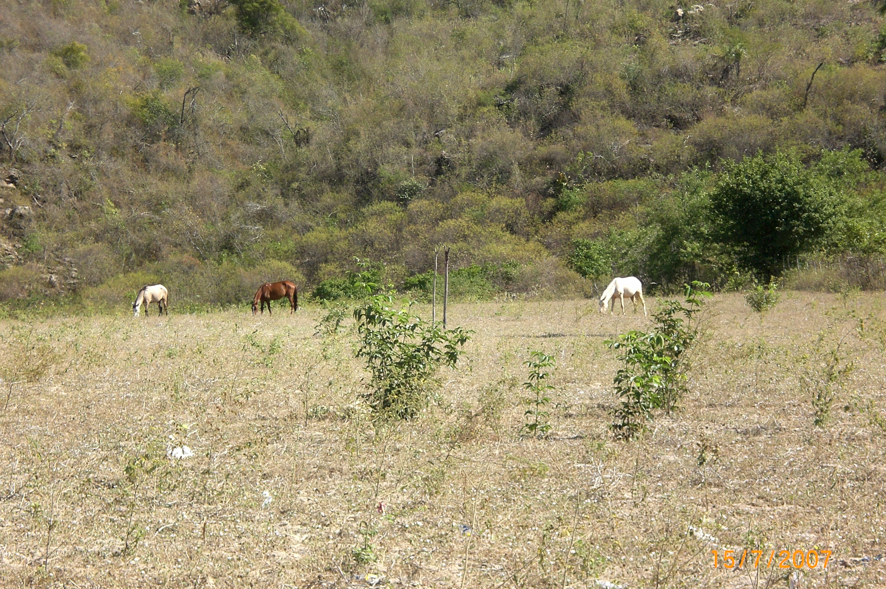 CAVALOS PASTANDO - SÍTIO GRAVATAZINHO - DISTRITO DE SÃO MIGUEL